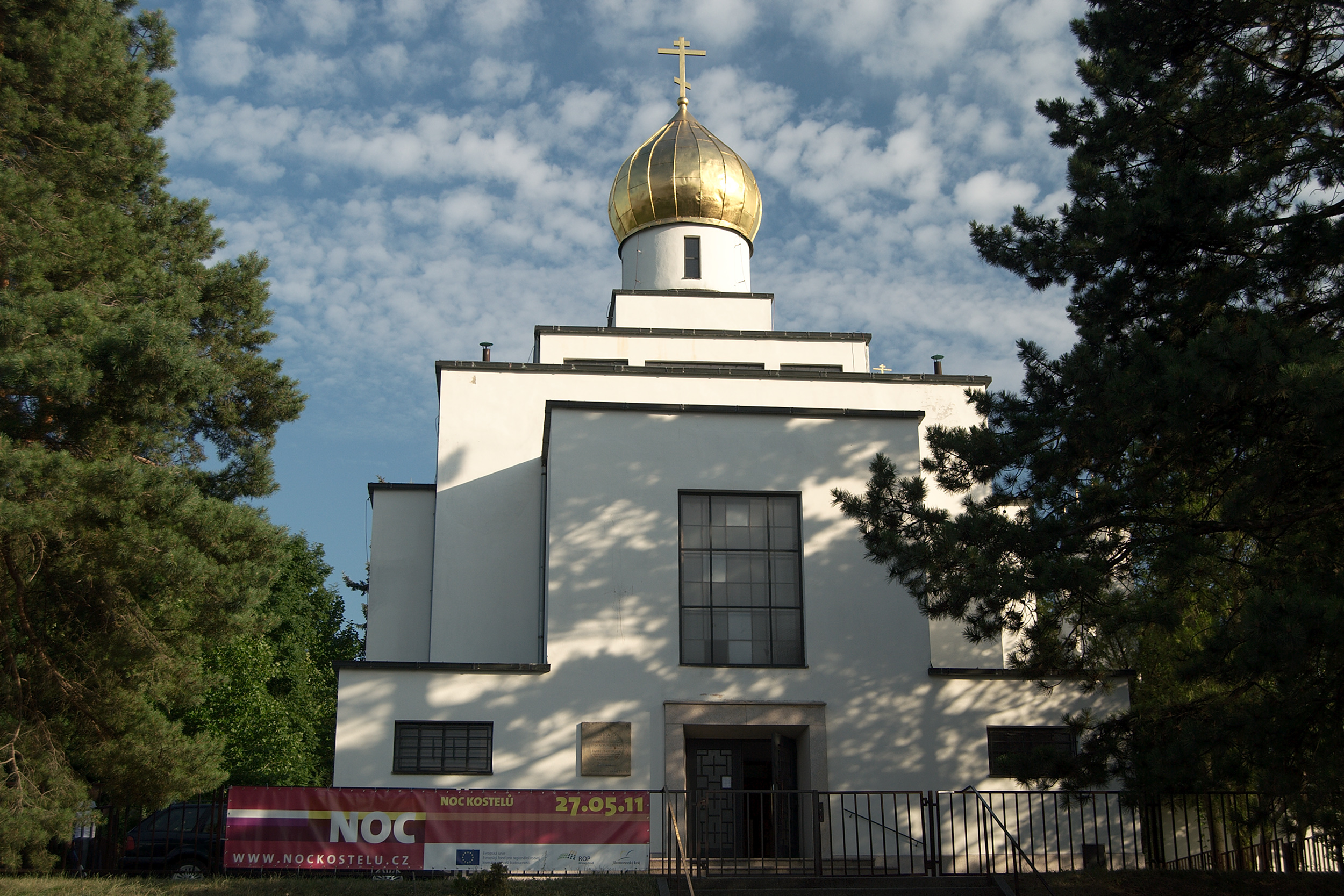 Město Brno - Pravoslavný chrám svatého Václava vyfotografovaný od severu